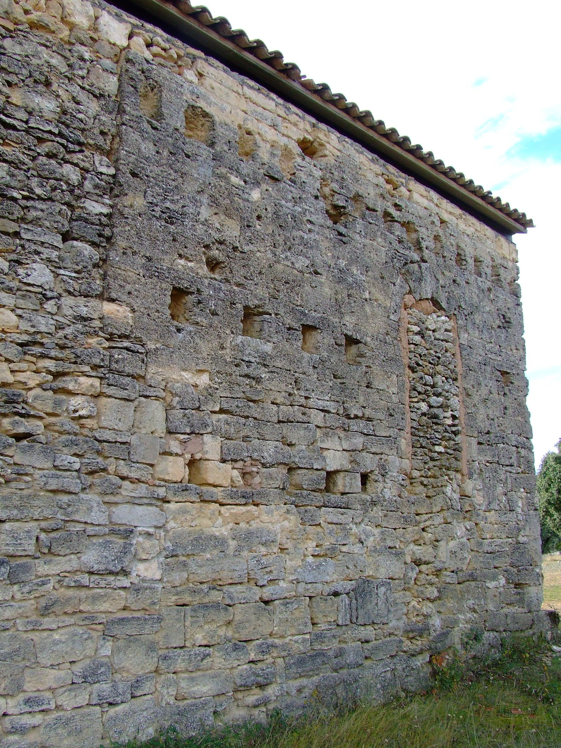 Mur nord del santuari de la Mare de Déu de les Esplugues (Conques, Isona i Conca Dellà, Pallars Jussà)